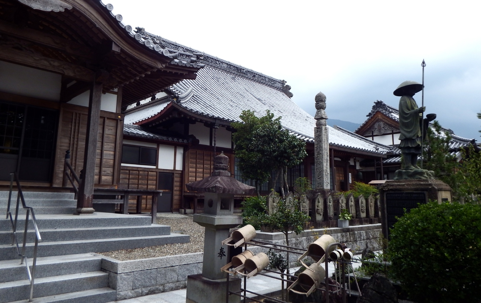 願勝寺の境内